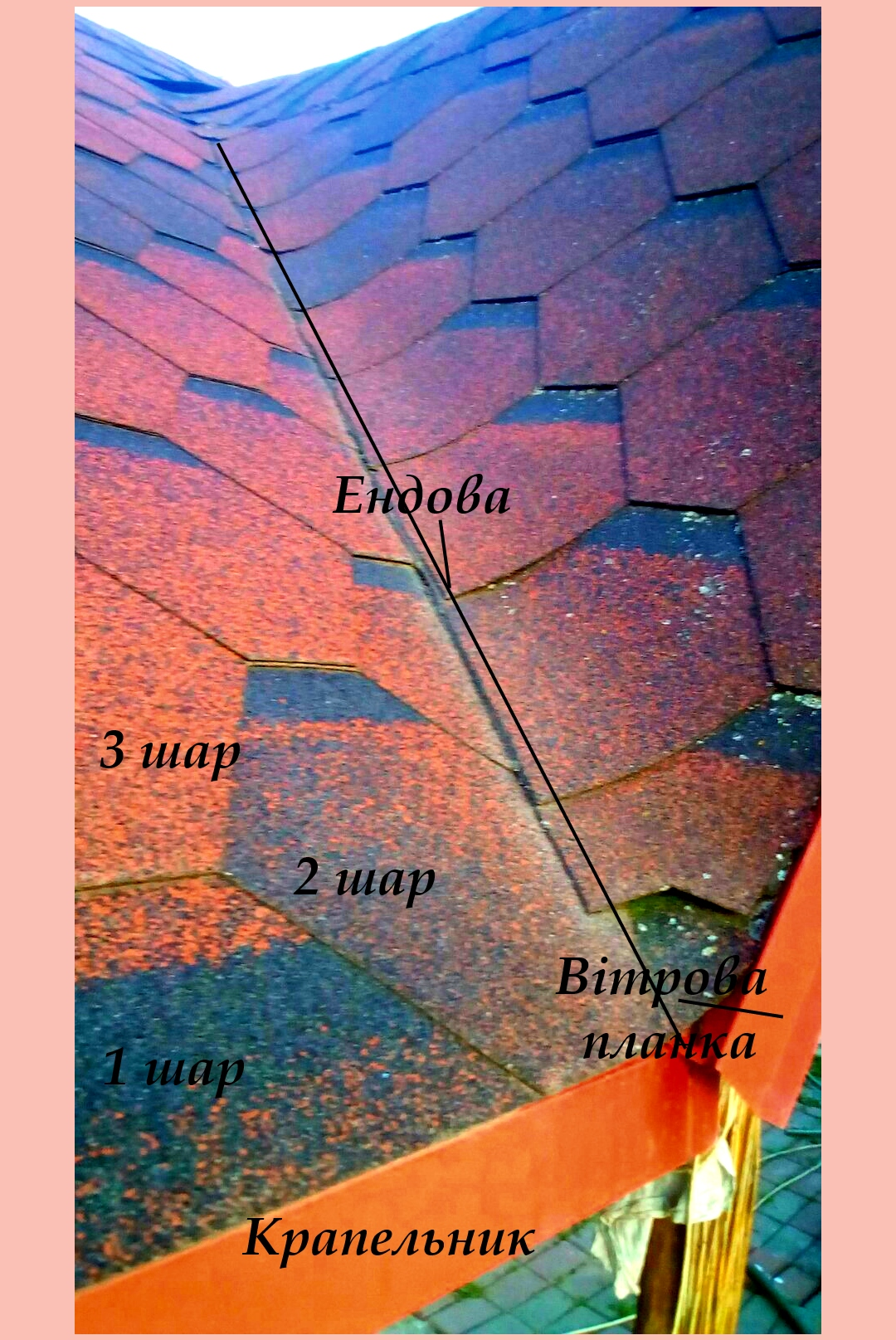 Бітумна Черепиця Внутр Кут Ендова 2